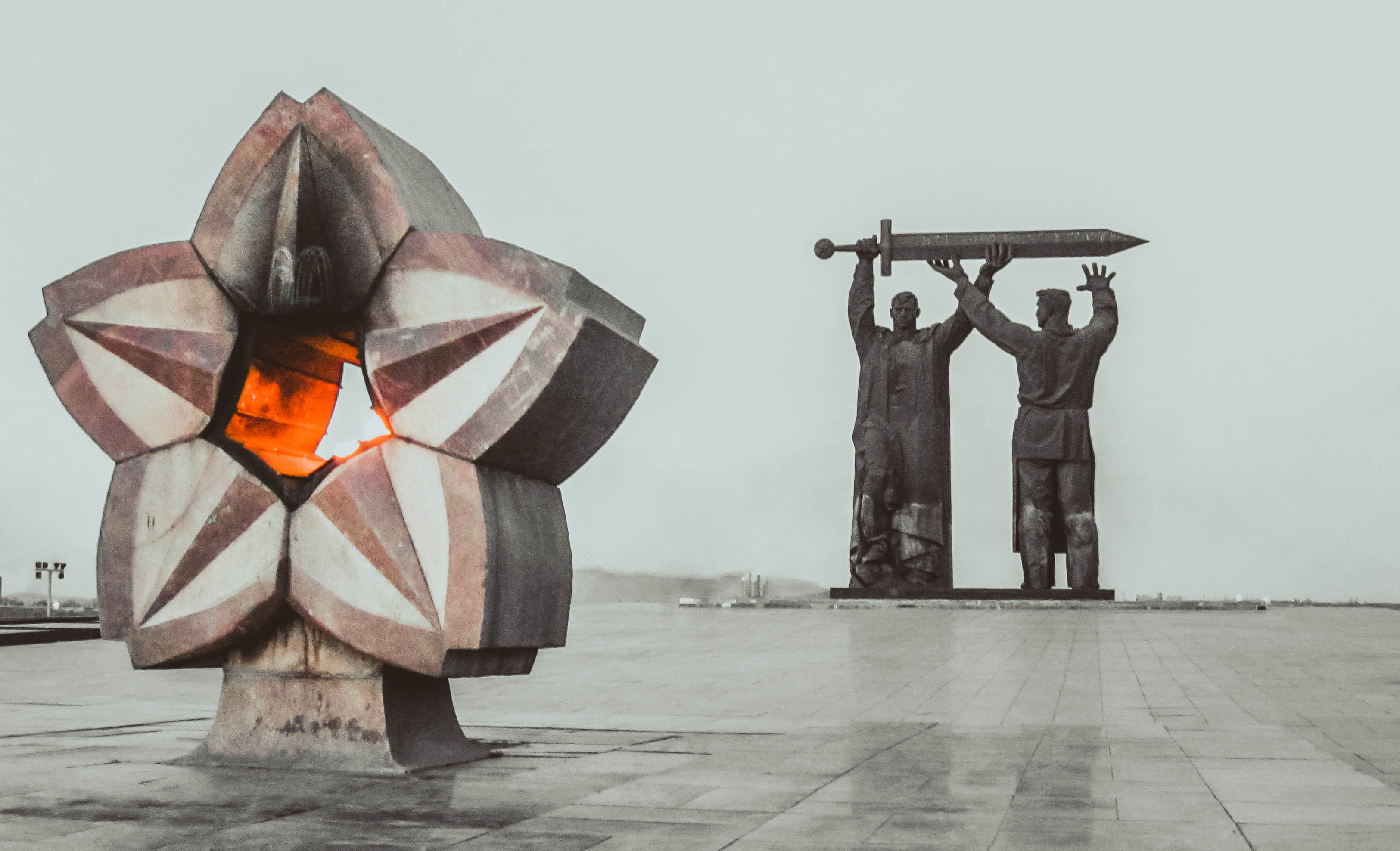 Памятник «Тыл и фронт»: ул. Правды, парк Металлургов, Магнитогорск, Челябинская область